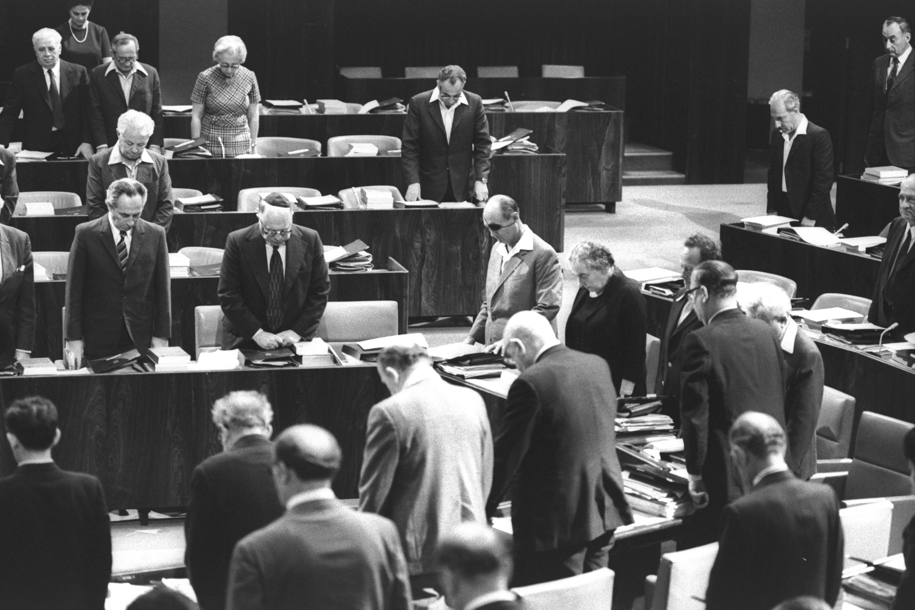 Cabinet and knesset members standing in silent tribute during the special knesset session on holocaust day (29/04/1973). השרים וחברי הכנסת עומדים דום בישיבת הכנסת המיוחדת ביום השואה. Photo: HERMAN CHANANIA.